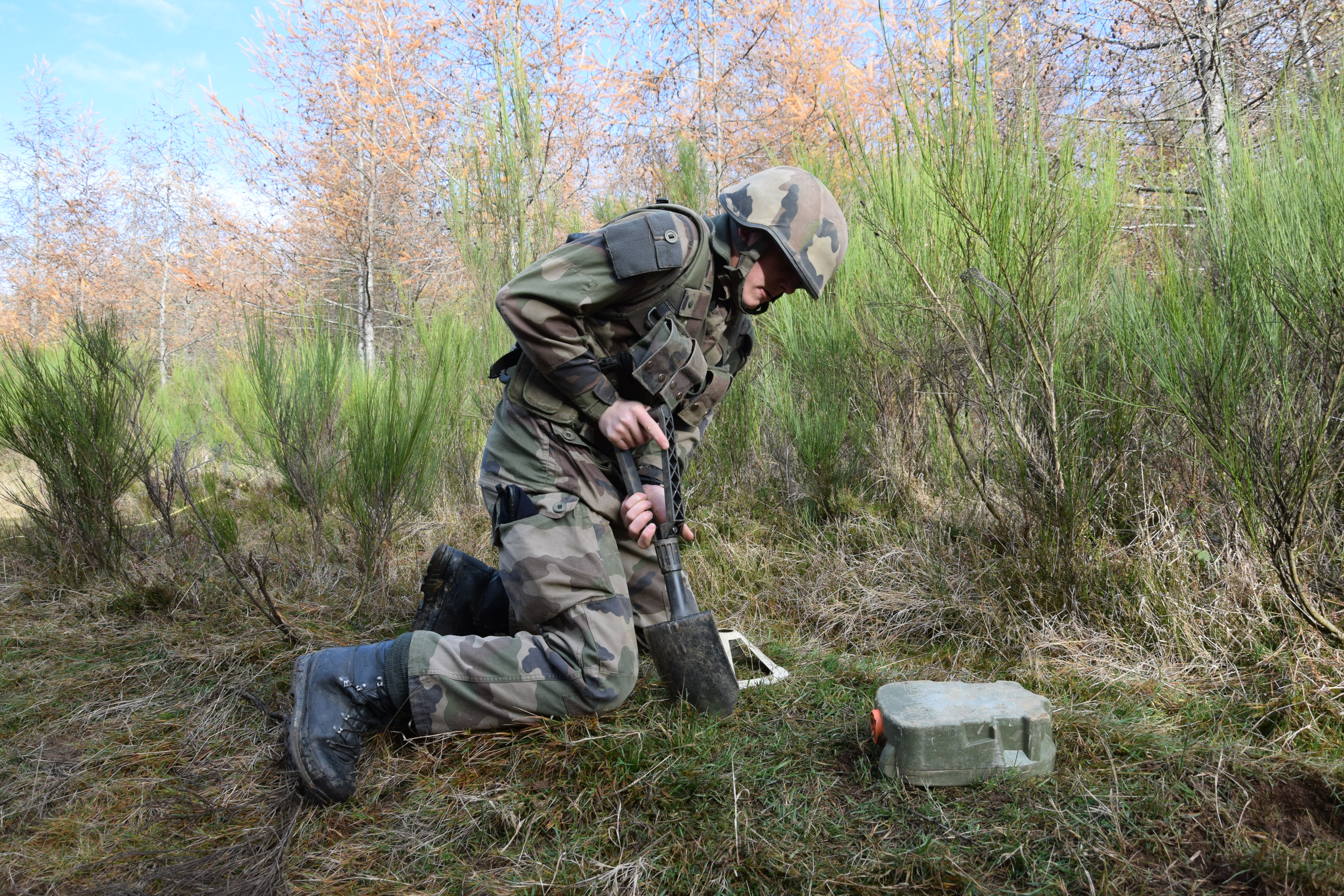 Sapeur de combat du 19e RG enterrant une mine antichar d'exercice.